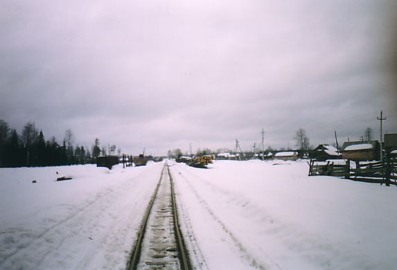 Восточная окраина посёлка Семигородняя. Здесь, на восточной окраине посёлка, также имеется путевое развитие. На заваленном снегом боковом пути стоит забытый сцеп, гружёный хлыстами. Харовский район, Вологодская область.